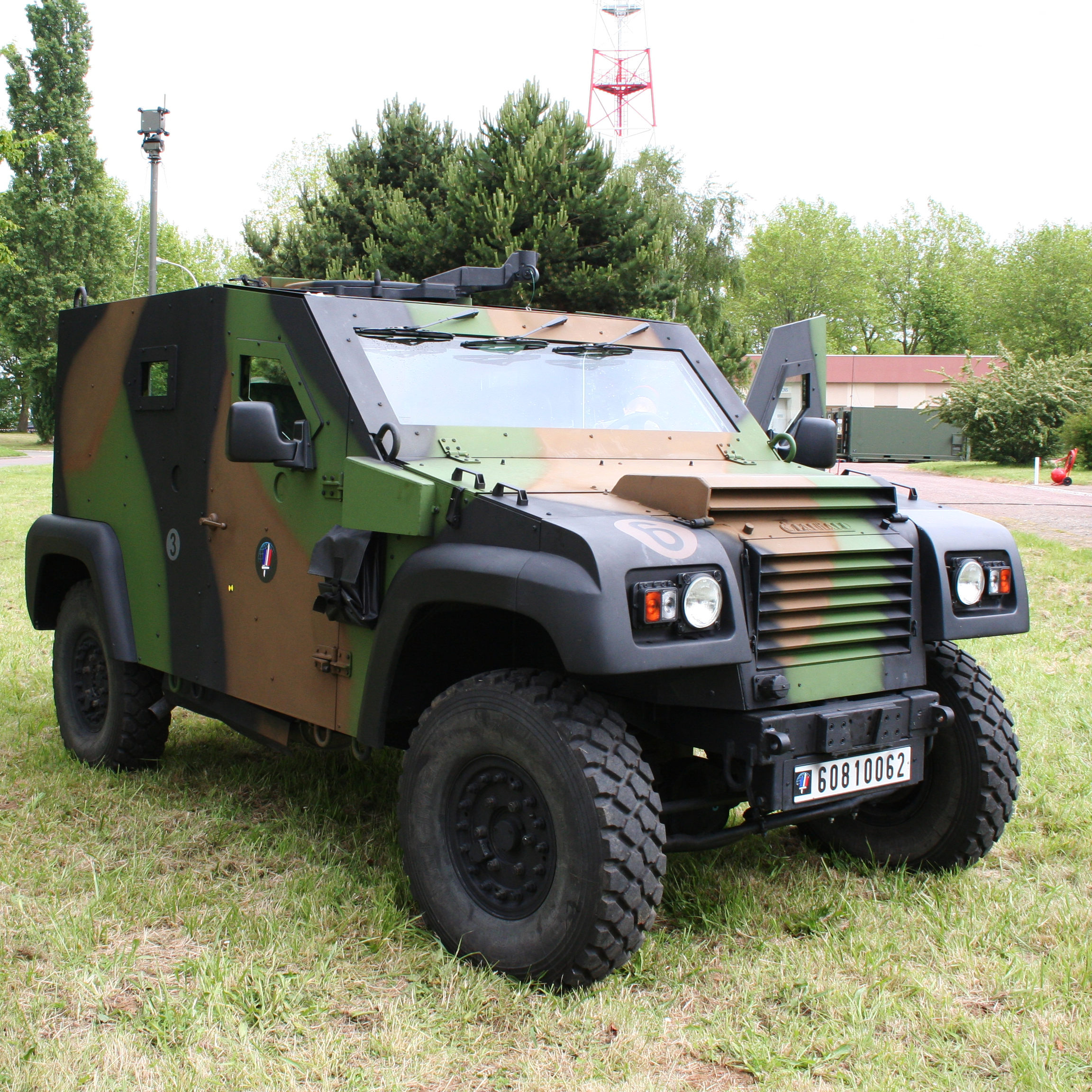 PVP